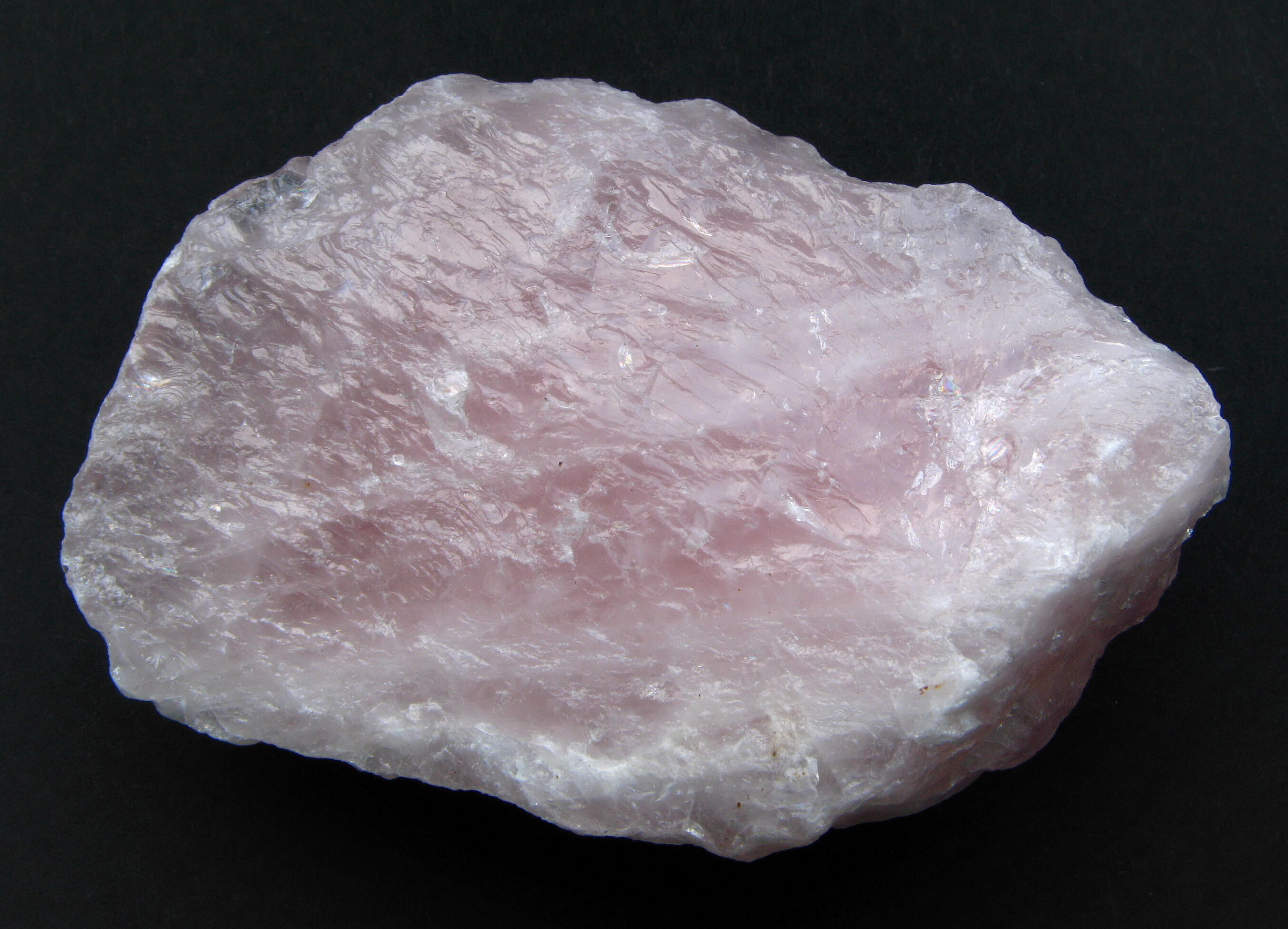 Rosenquarz, Rohstein